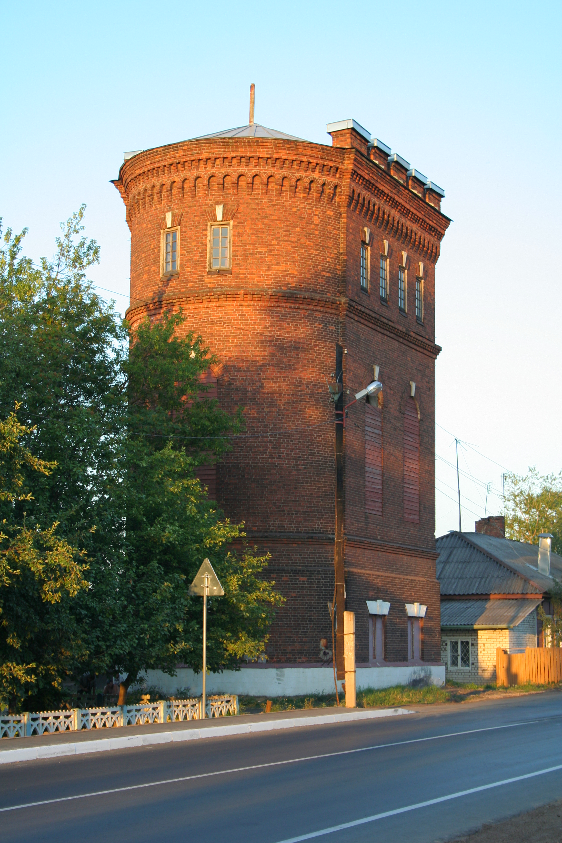 Stadt Lichoslawl (Oblast Twer, Russland). Wasserturm nahe dem Bahnhof.